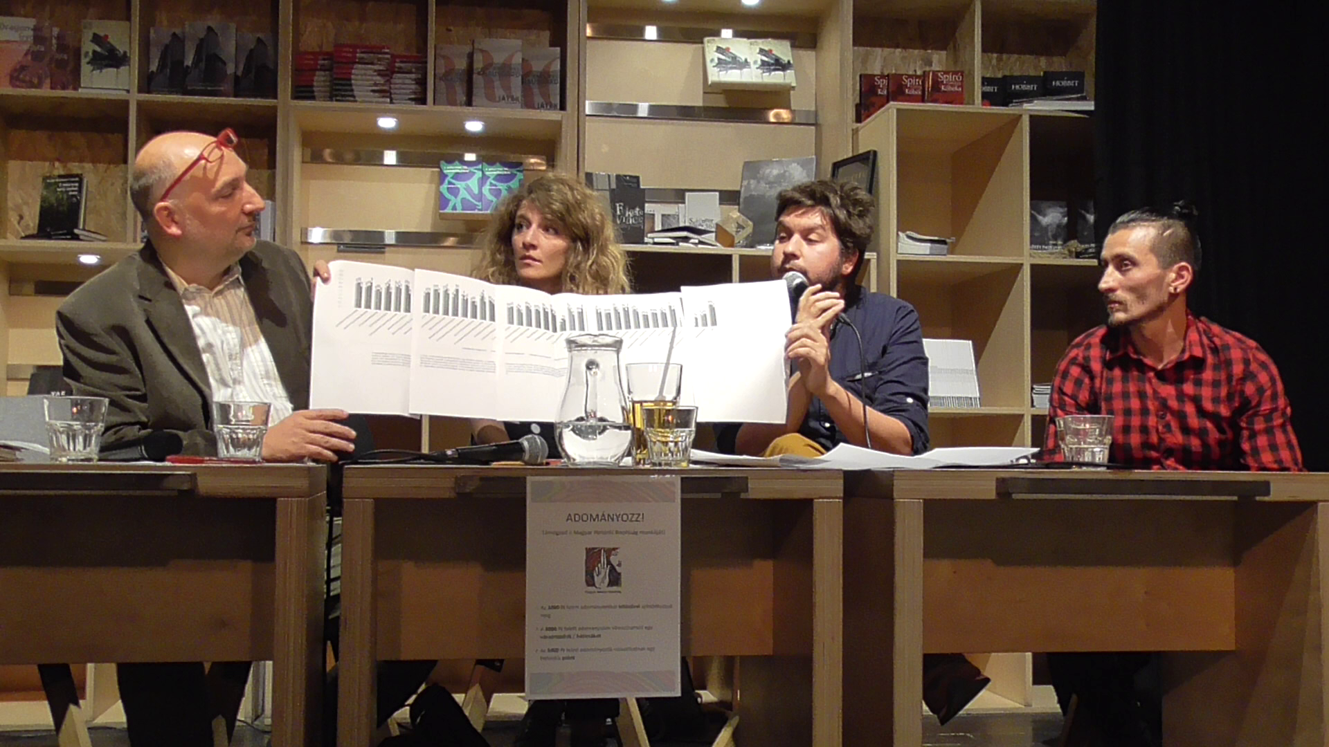 Állókép a Magyar Helsinki Bizottság előadásából